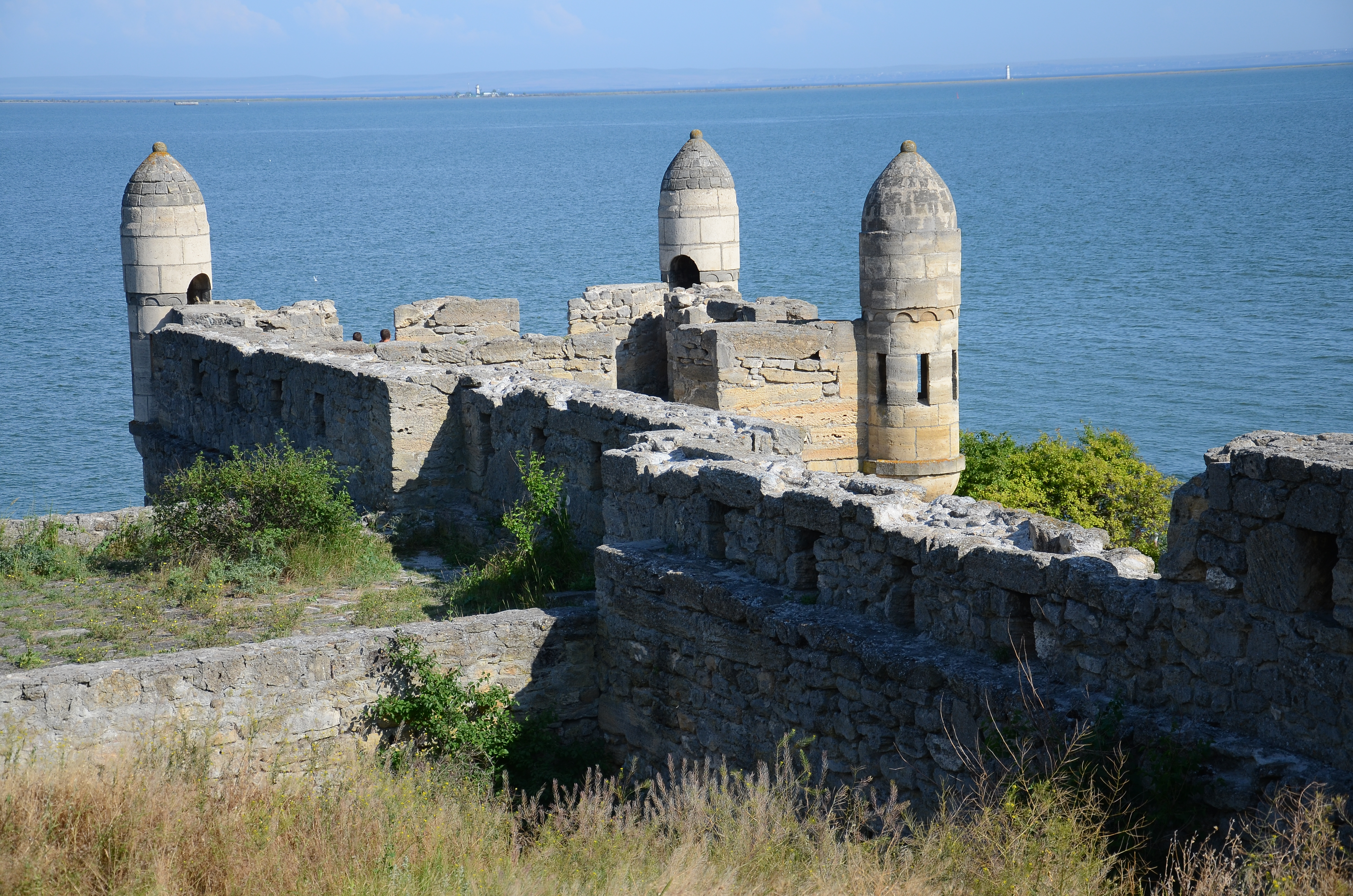 Еникале